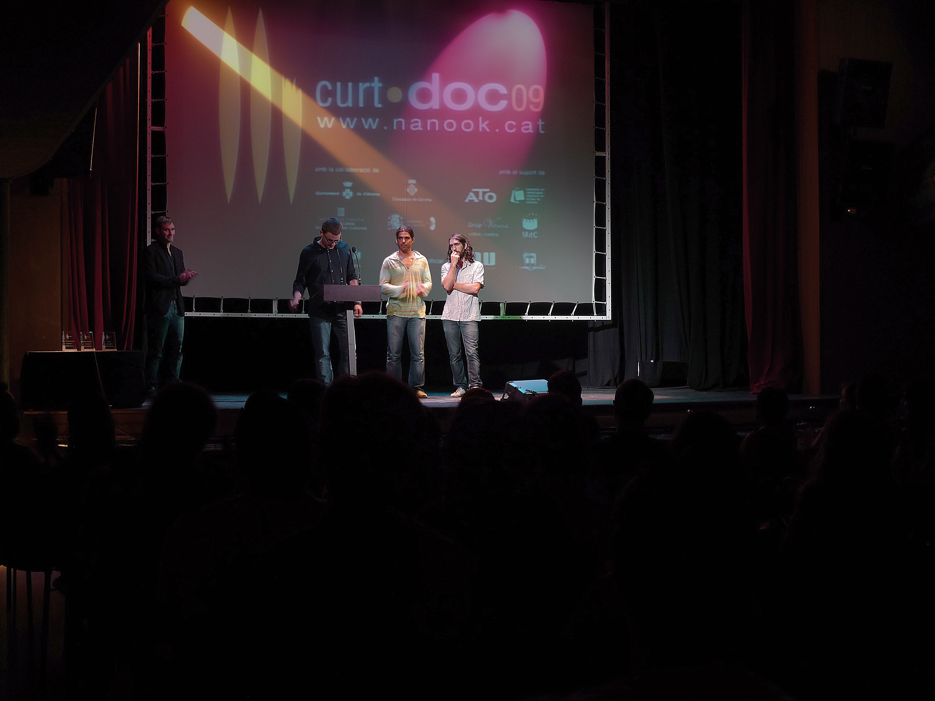 Lliurament de Premis Curt.doc